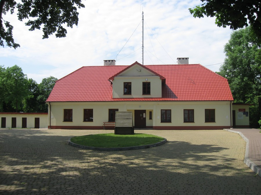 Mały Płock, dwór (zabytek nr rejestr. A-474)